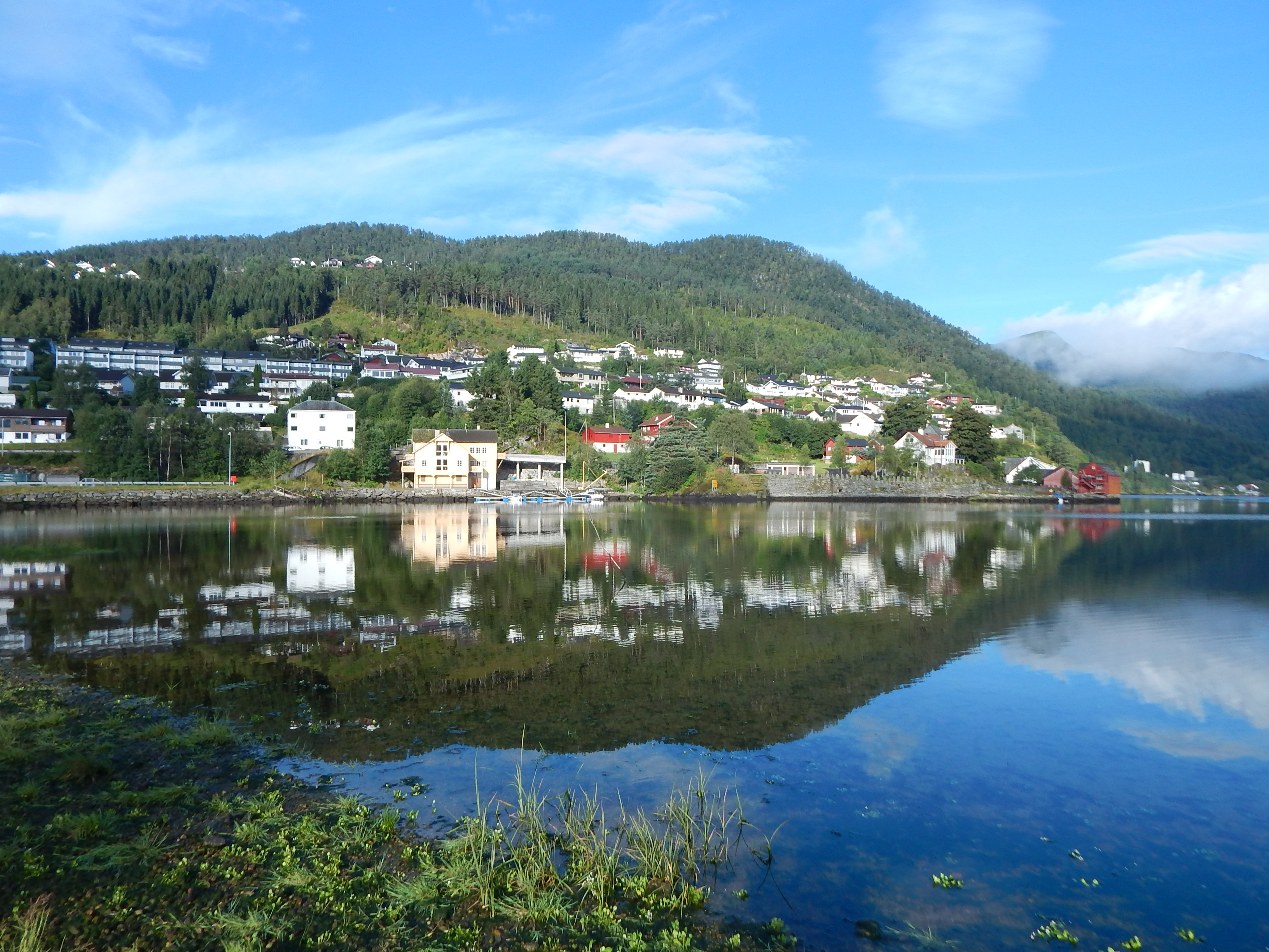 Fra utkanten av Førde by